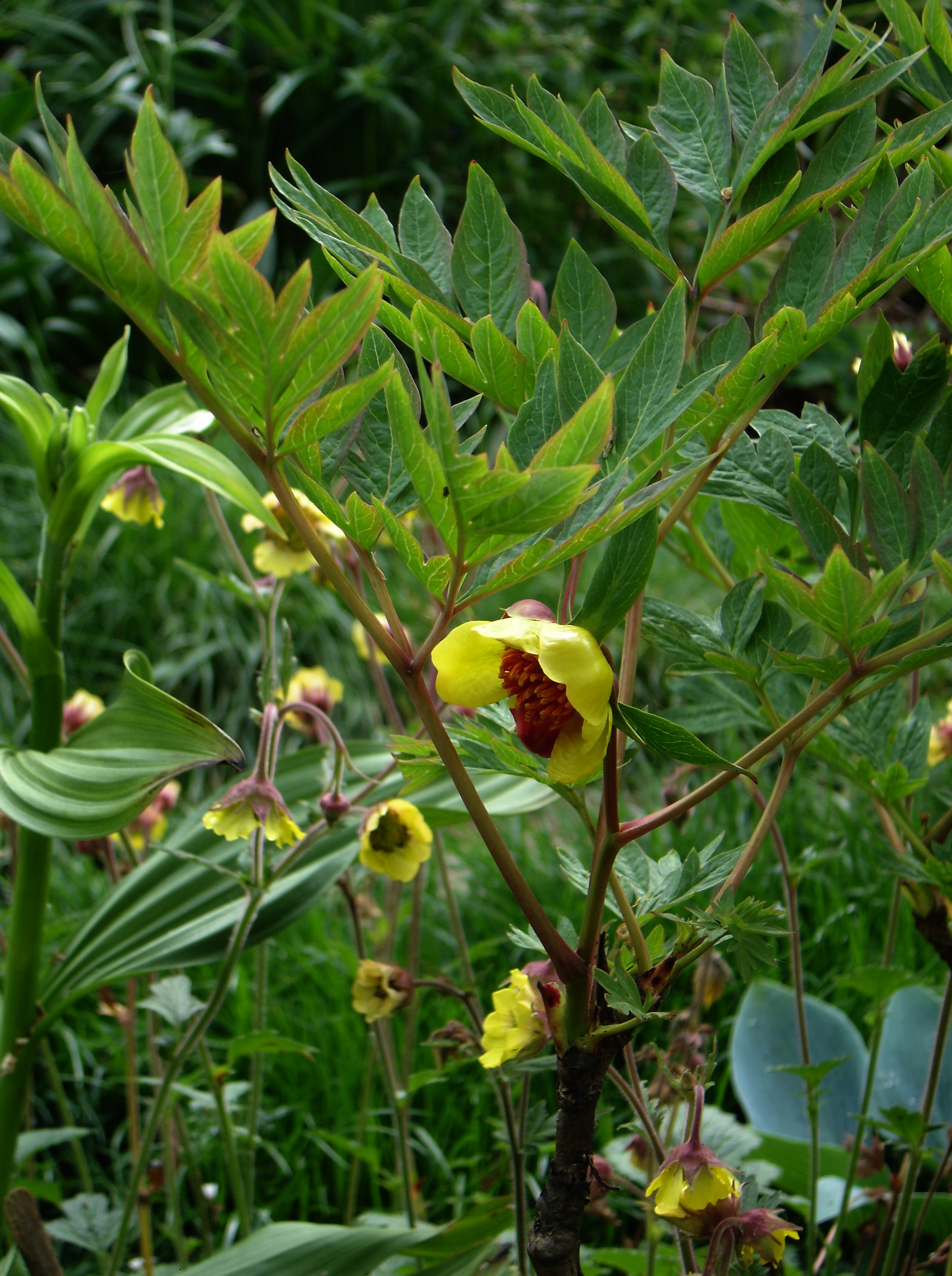 Paeonia delavayi